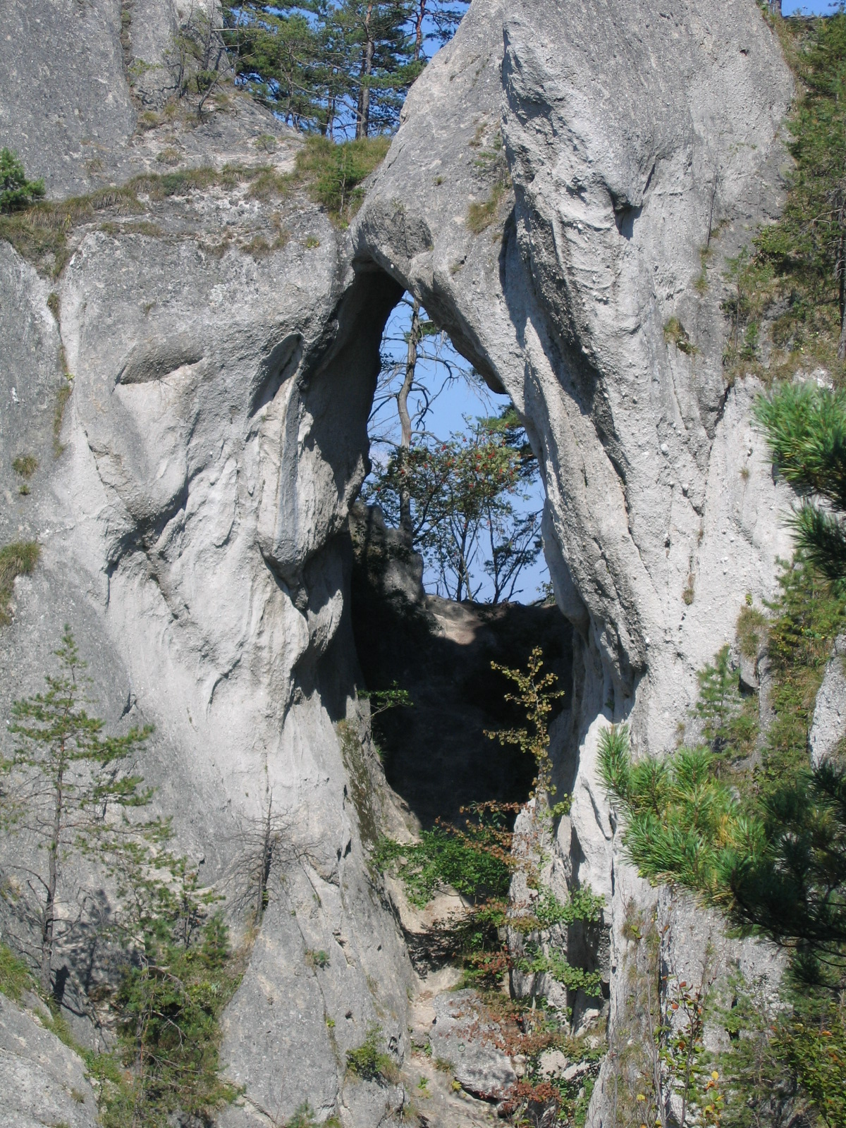 sk: Súľovské skaly, útvar Gotická brána, Slovensko, sept 2006 en: Súľov rocks, Slovakia sept 2006 author:Juloml